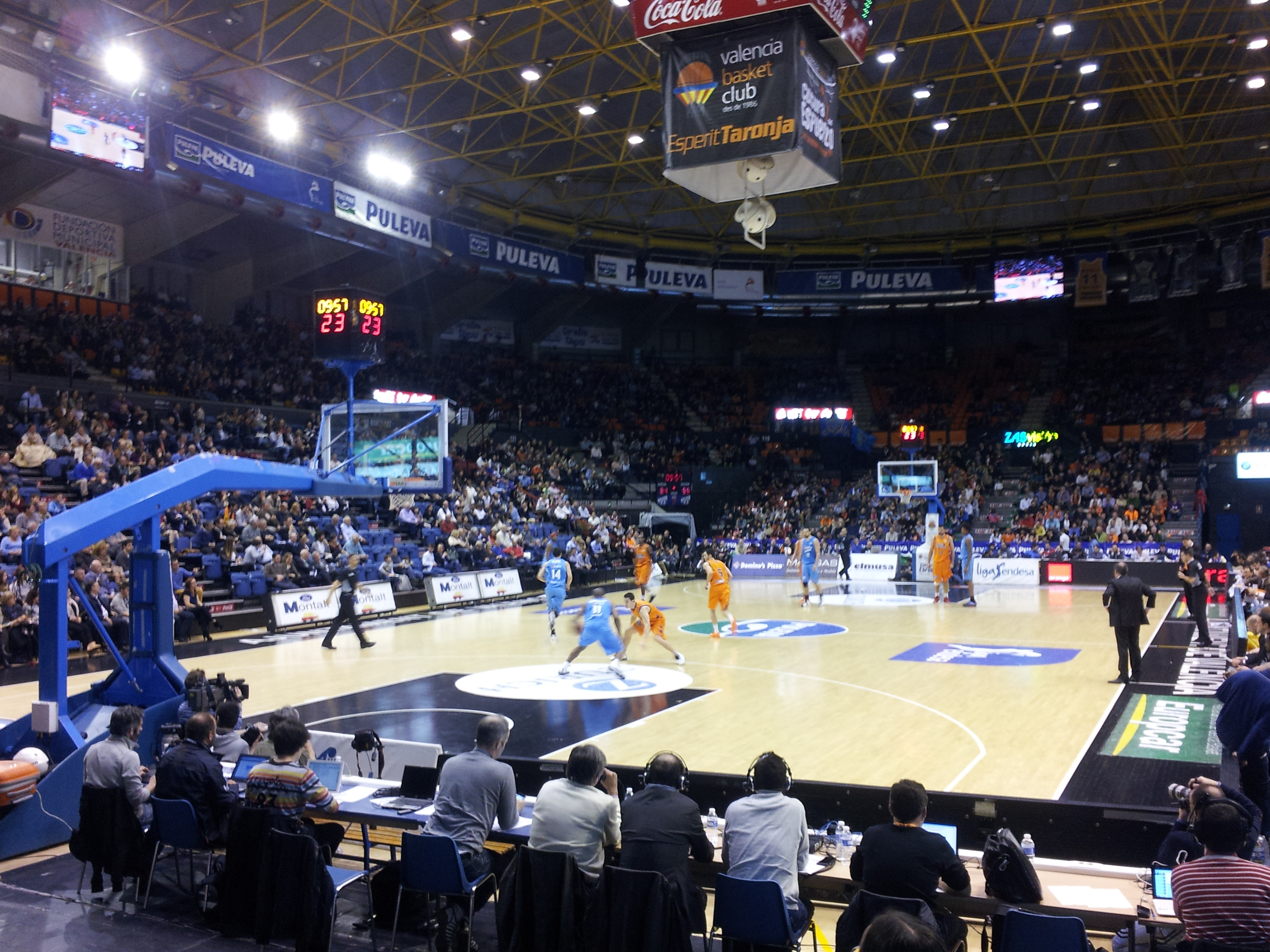 La Fonteta en un València-Estudiantes del 9 de març de 2013.